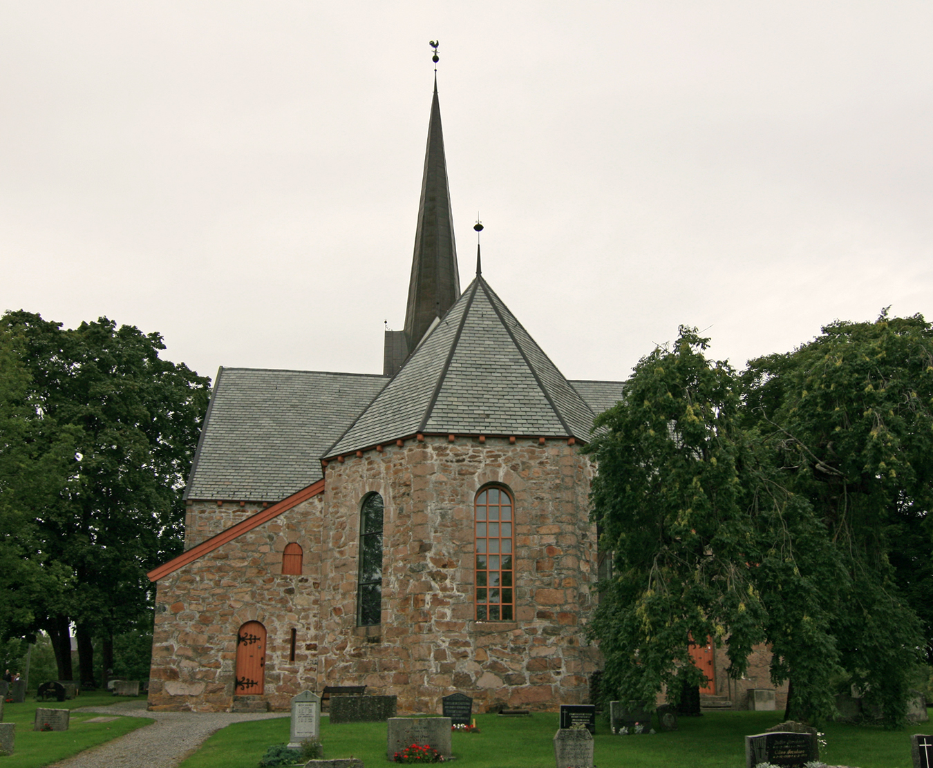 Skedsmo kirke